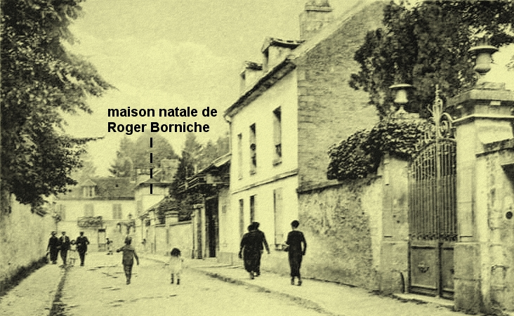 La maison natale de Roger Borniche, rue de la Carrière aux Daims à Vineuil Saint Firmin (Oise)